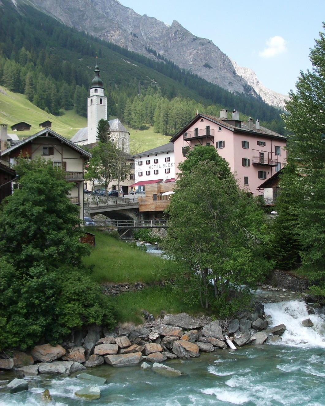 Splügen GR, Switzerland self-made, June 2006